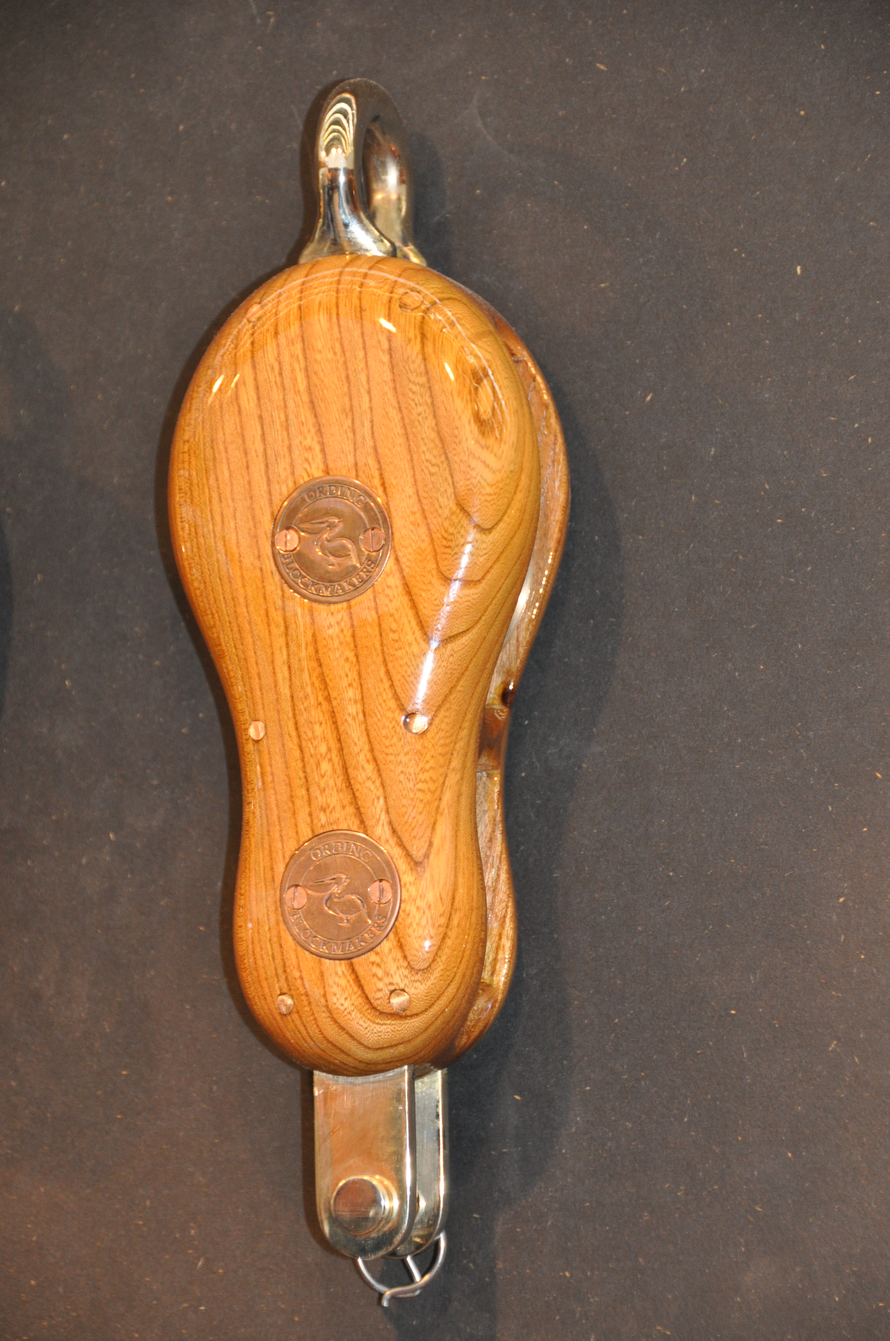 METS 2009 Blocks made by Ording in Almere, The Netherlands